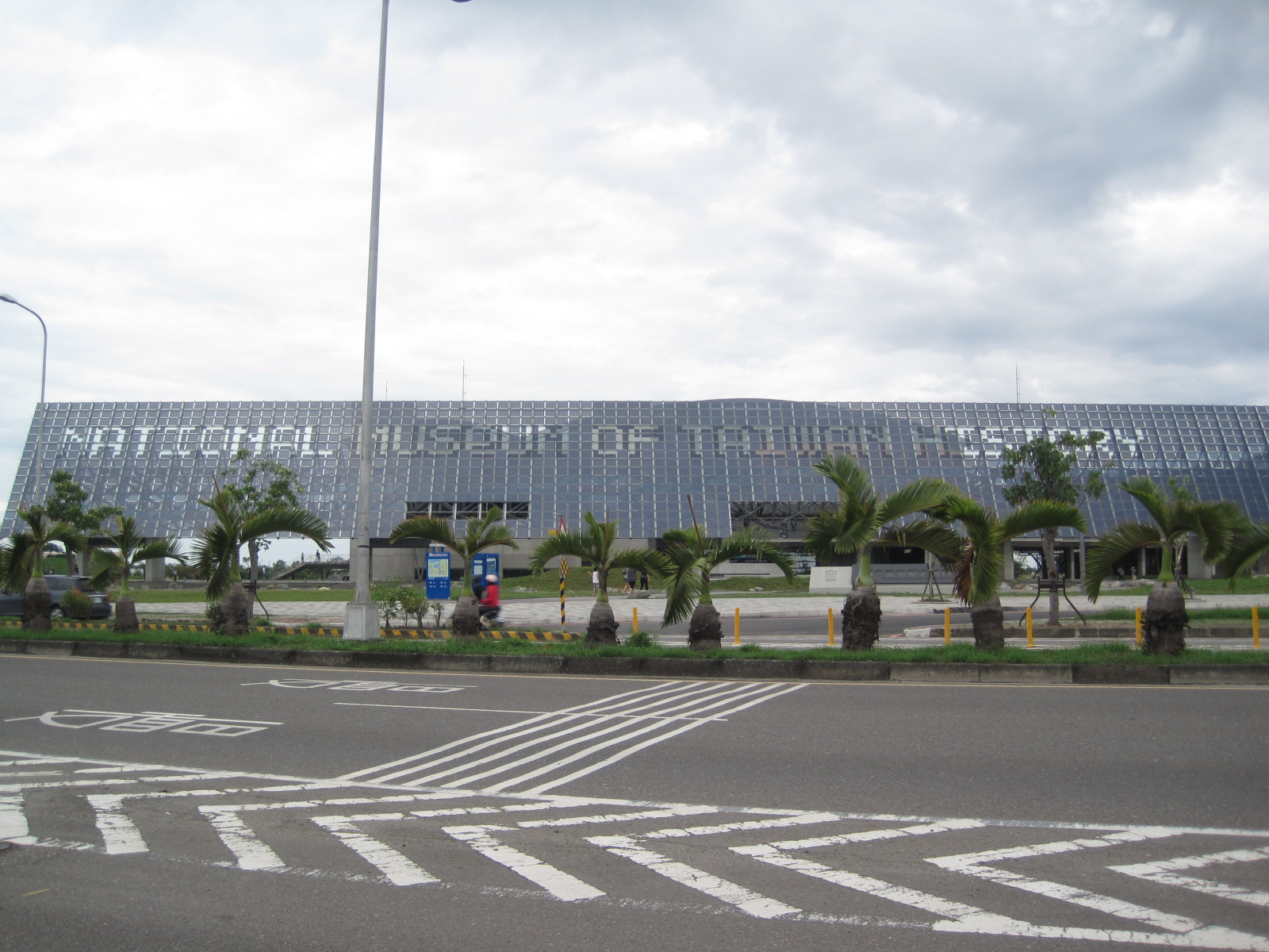 國立臺灣歷史博物館的光電雲牆